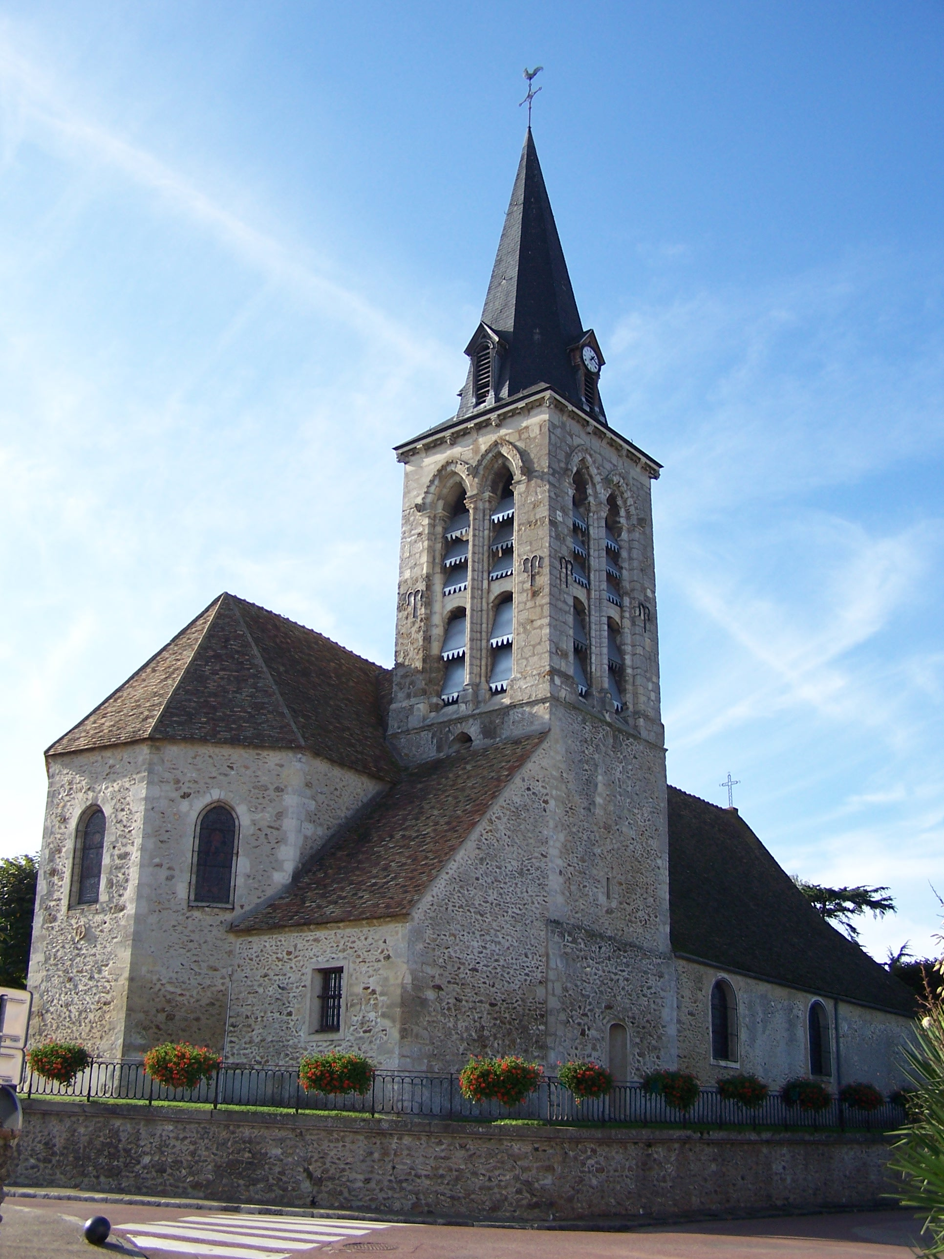 Église de Méré (Yvelines, France)